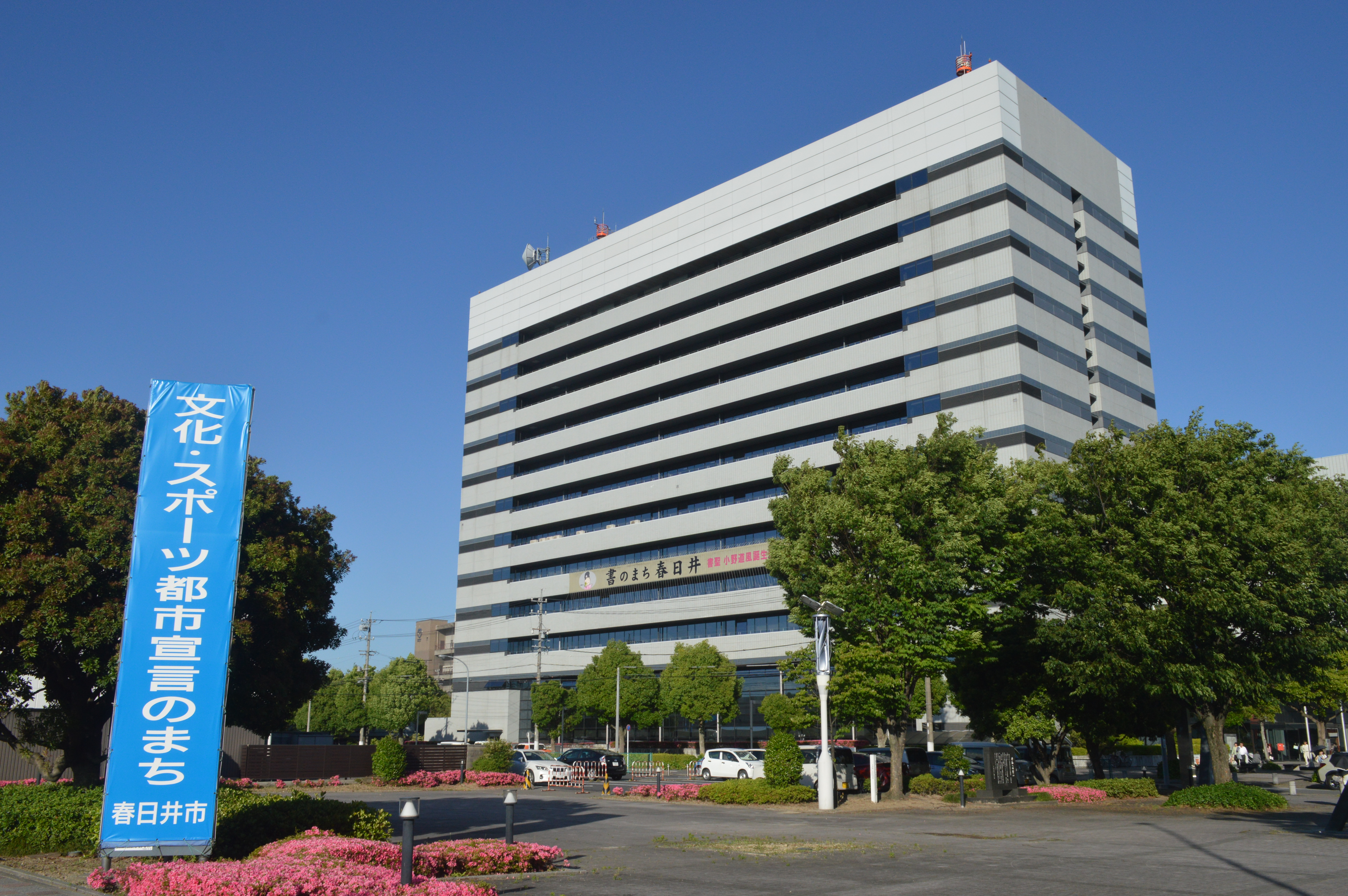 愛知県春日井市の春日井市役所。